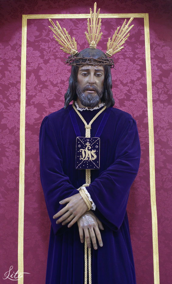 Fotografía propia realizada por Manuel Francisco Álvarez.